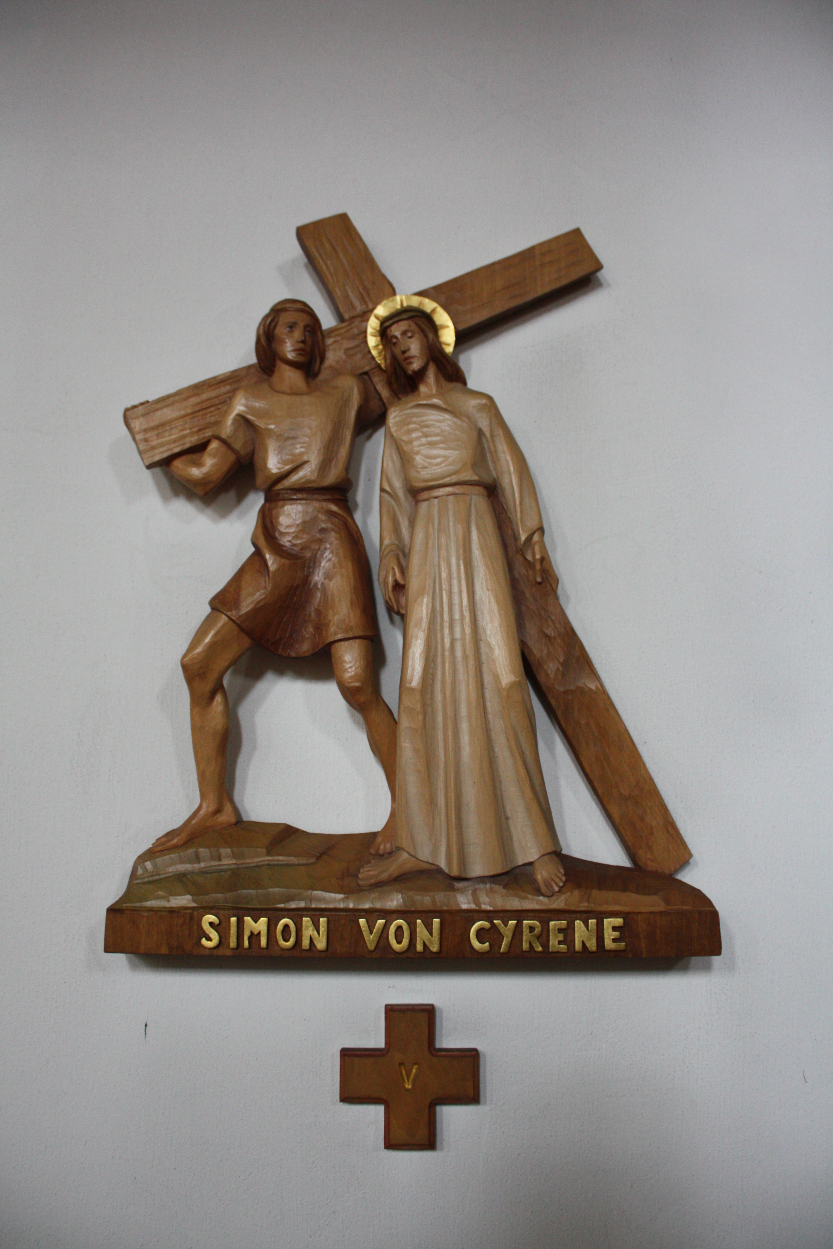 St. Heinrich in Sende